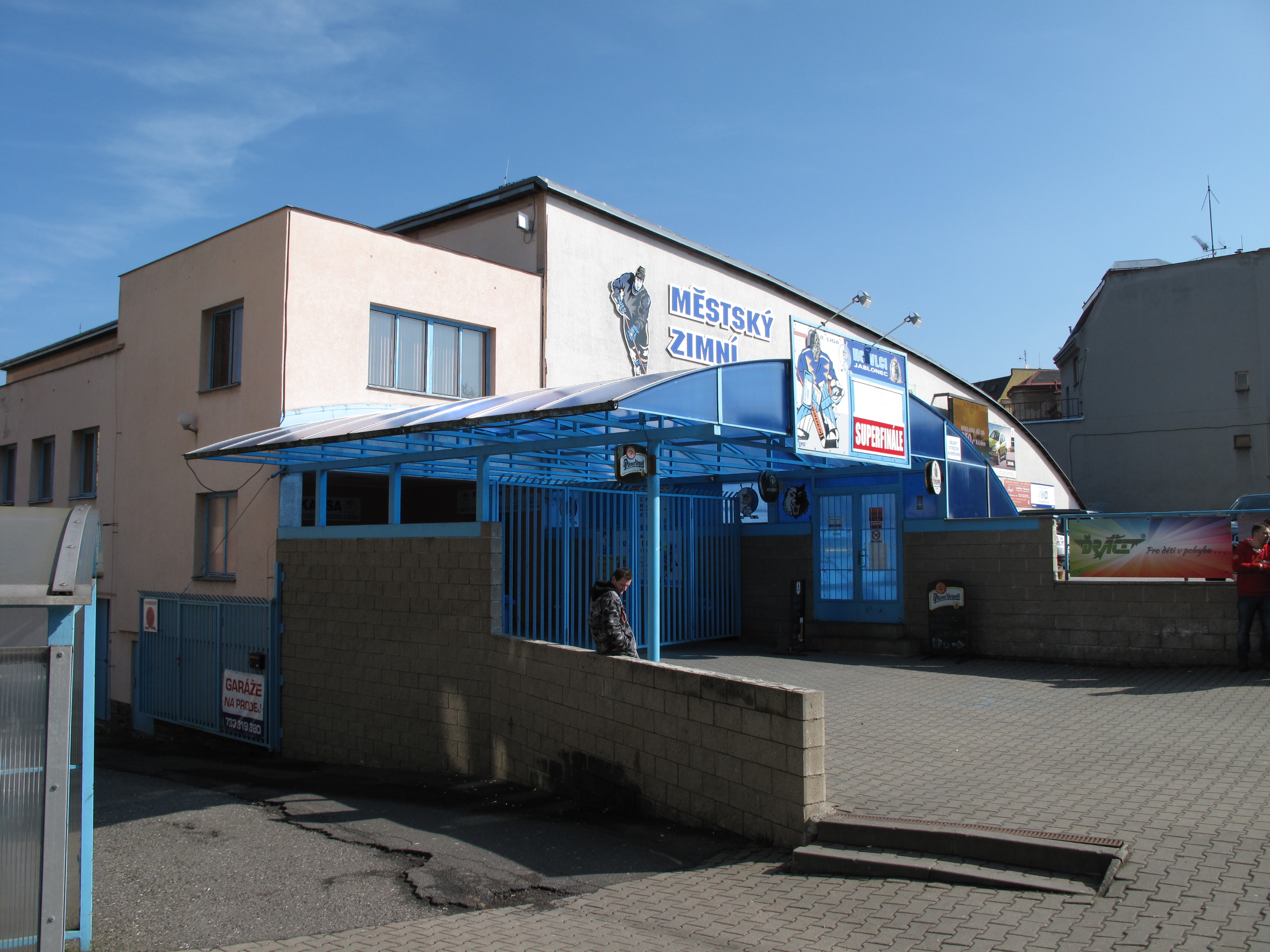 Jablonec nad Nisou, Česká republika.